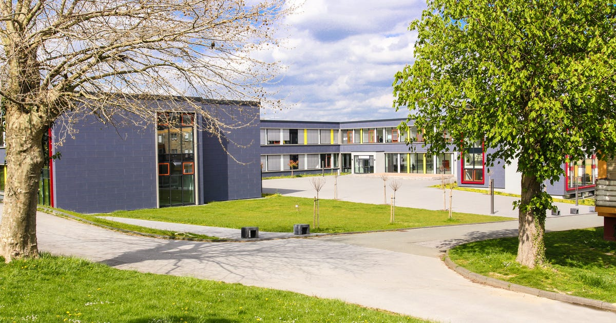 Aufnahme des Schulhofs der Schulen in Eringerfeld